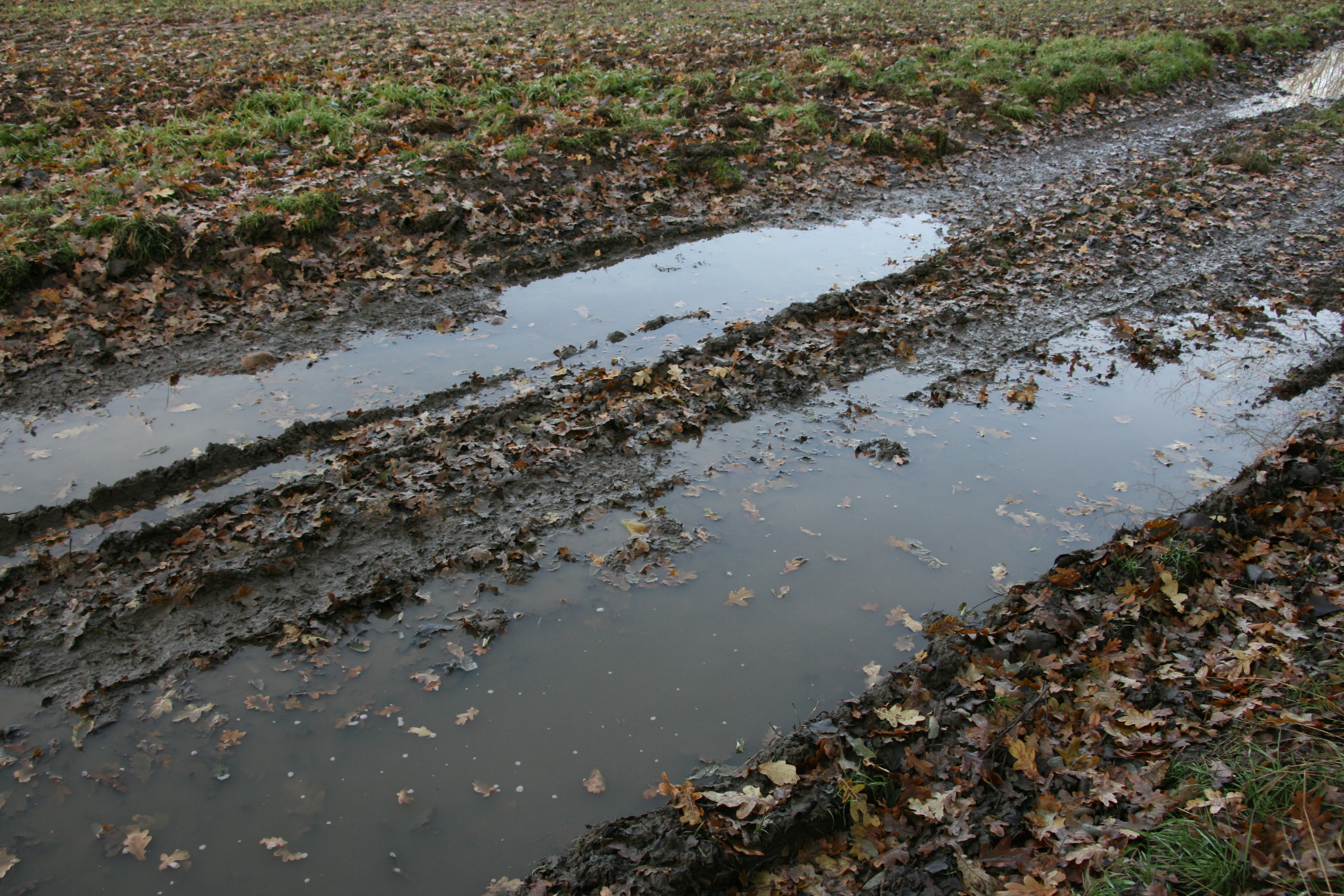 Cesta na Úpoře